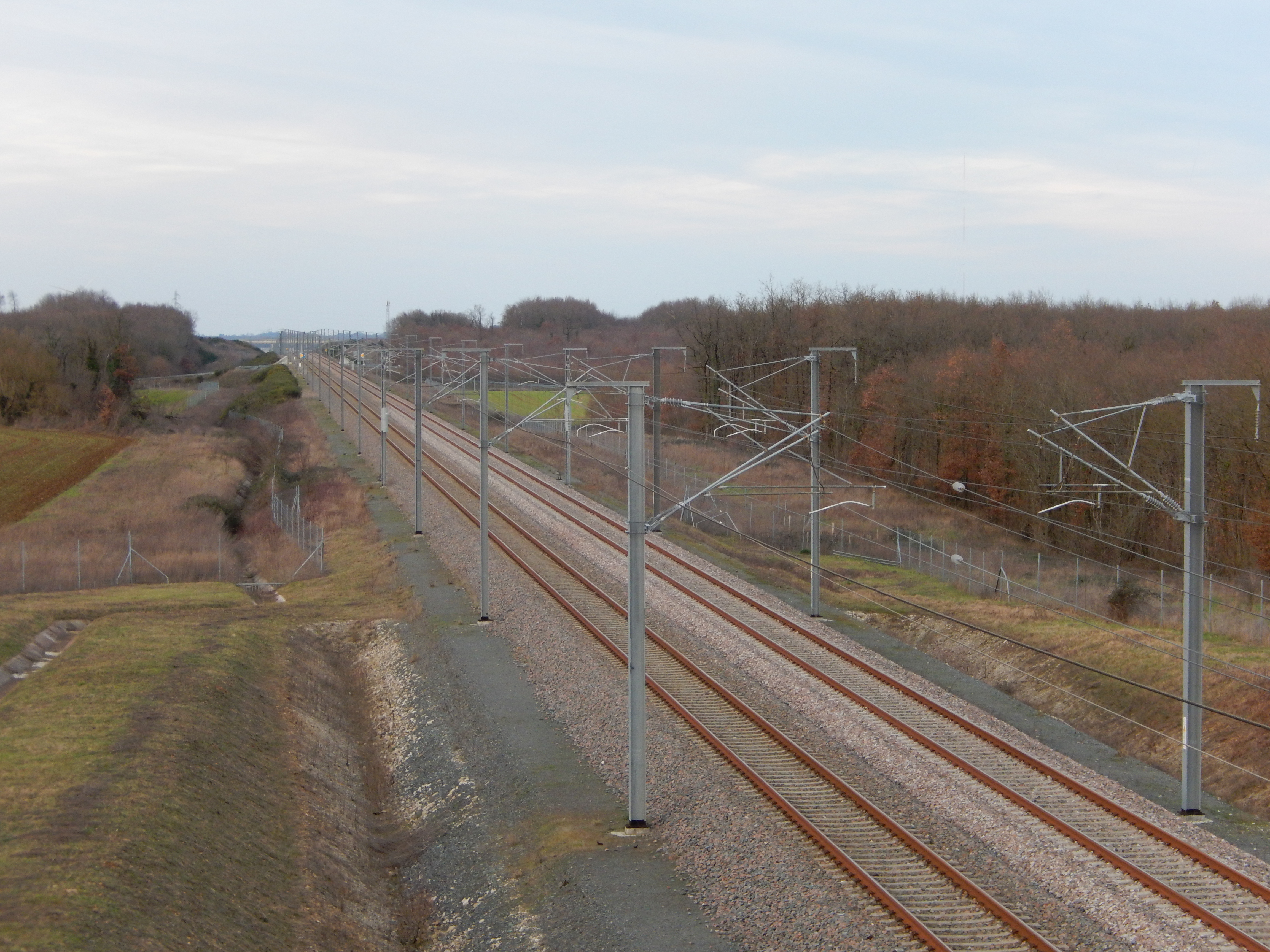 La ligne de chemin de fer à grande vitesse Sud-Europe-Atlantique, à quelques centaines de mètres du village de Raix, dans le département de la Charente. Cette vue est orientée vers l'extrémité septentrionale de la ligne.